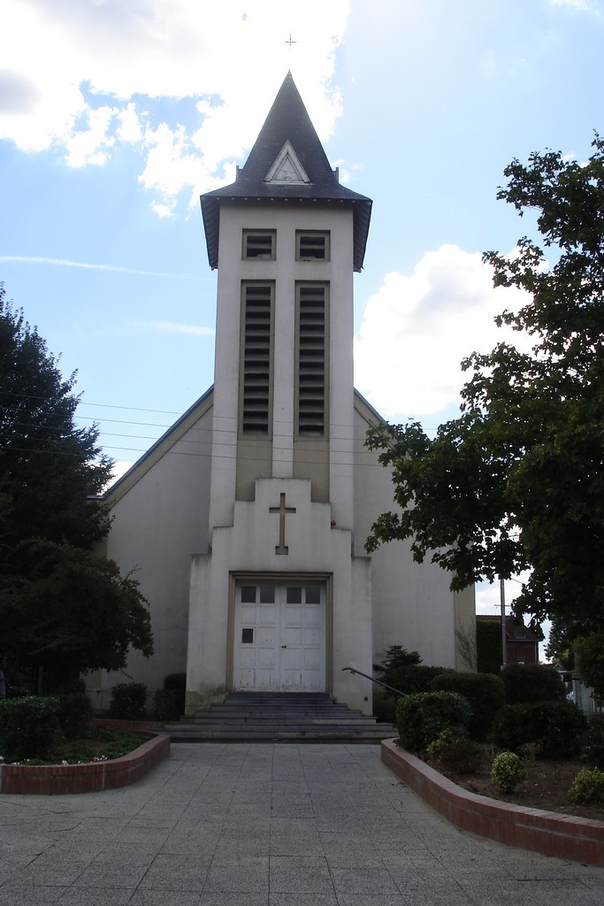 Photo prise par mes soins, il s'agit de l'église d'Eleu-dit-Leauwette 62300 France